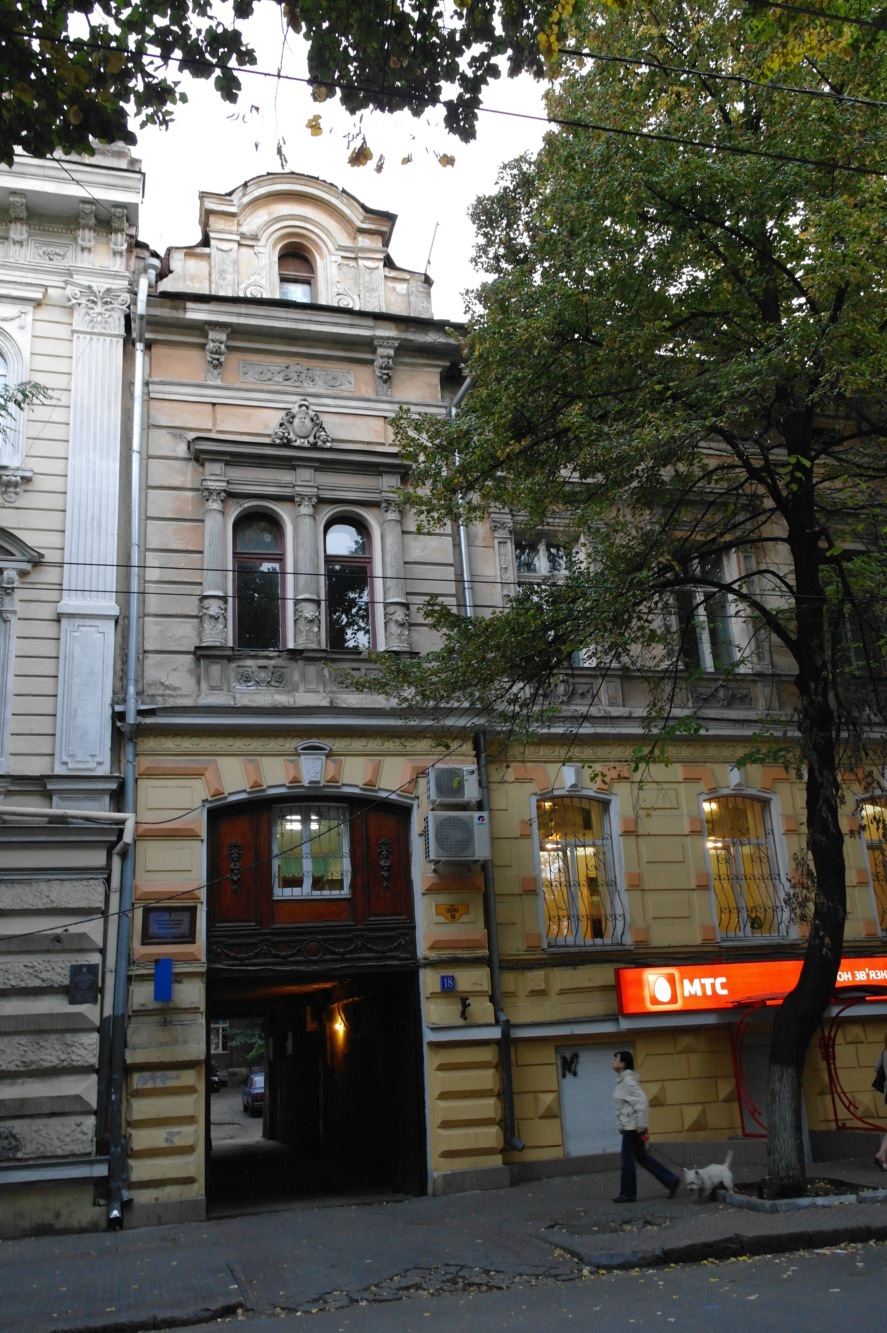 Одеса, Садова, 18